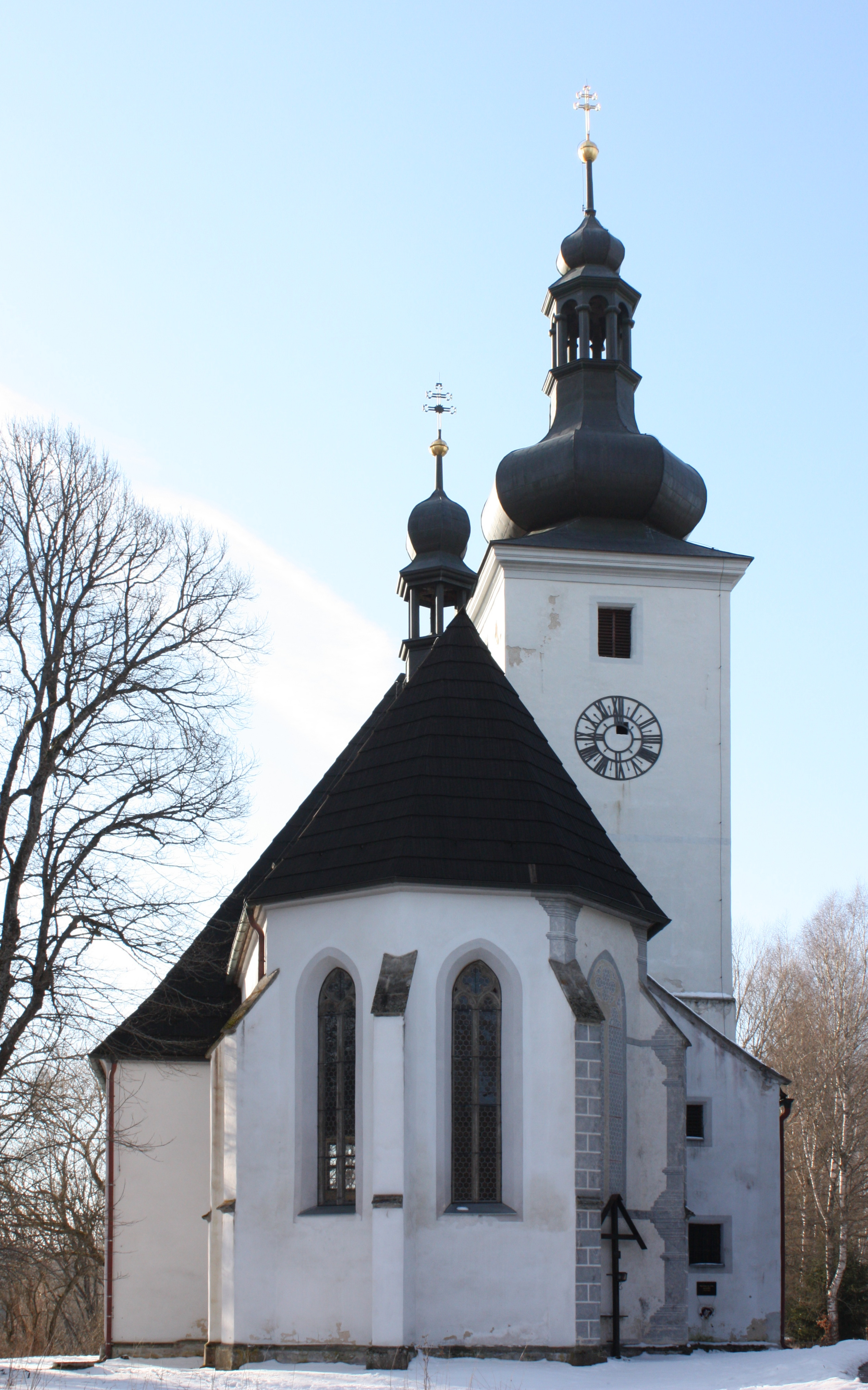 pohled